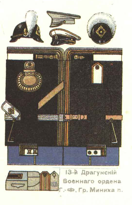 Garwolin